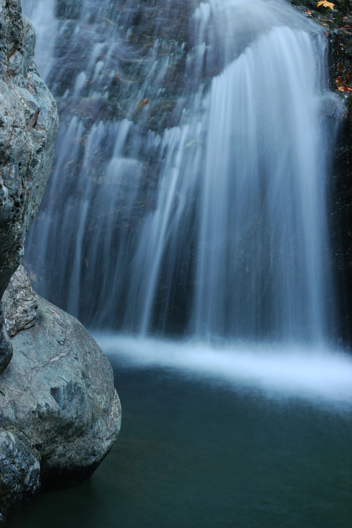 Καταρράκτης στη διαδρομή της Γριάς Βάθρας. This is a photography of Natura 2000 protected area with ID GR1110004